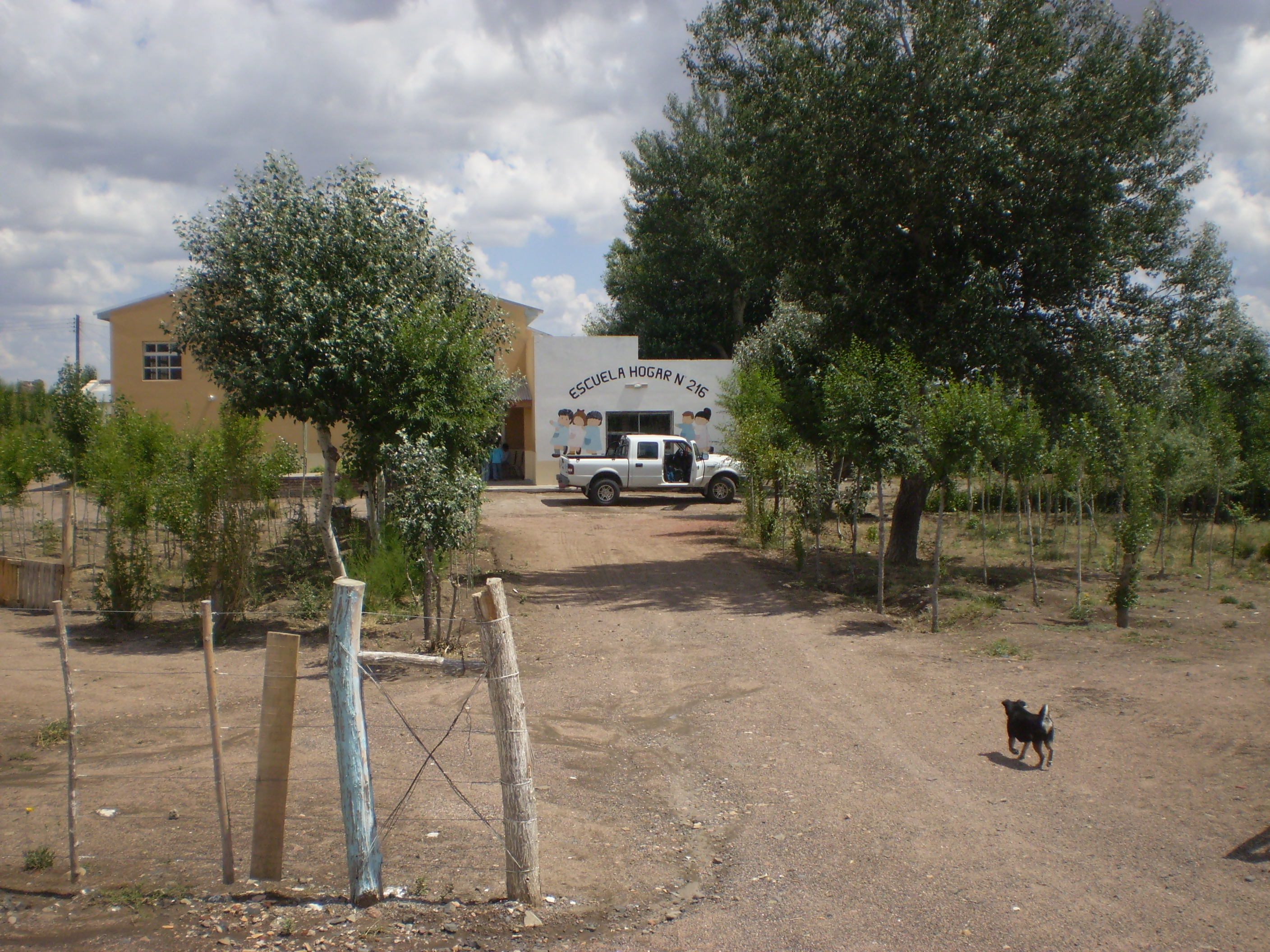 Escuela Hogar nro 216 del paraje Colan Conhue. Provincia de Río Negro